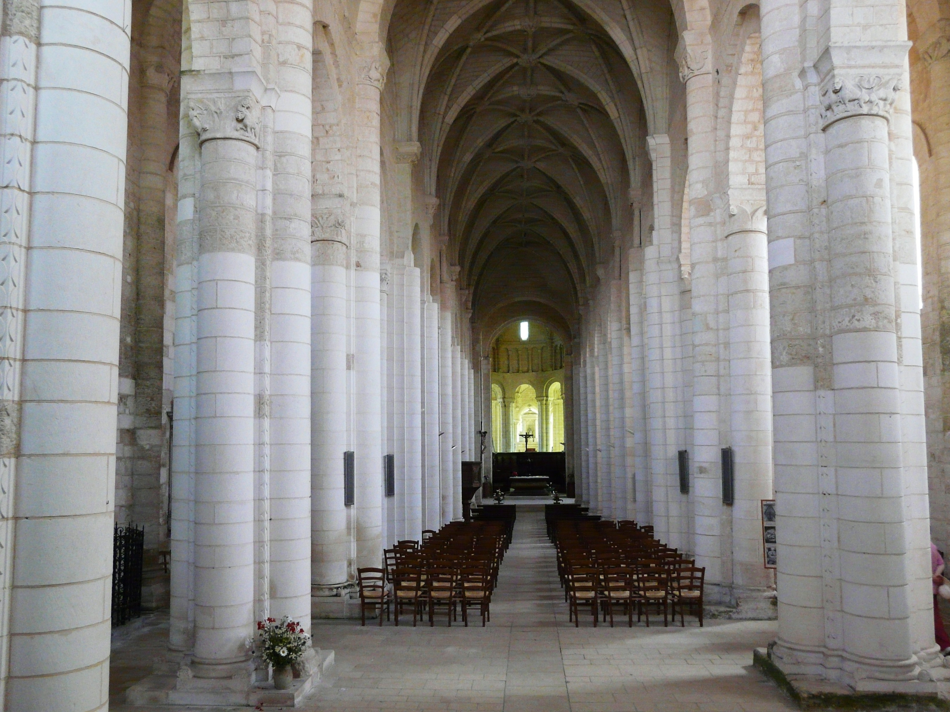 Nef de l'abbaye Saint-Jouin-de-Marnes, Deux-Sèvres, France